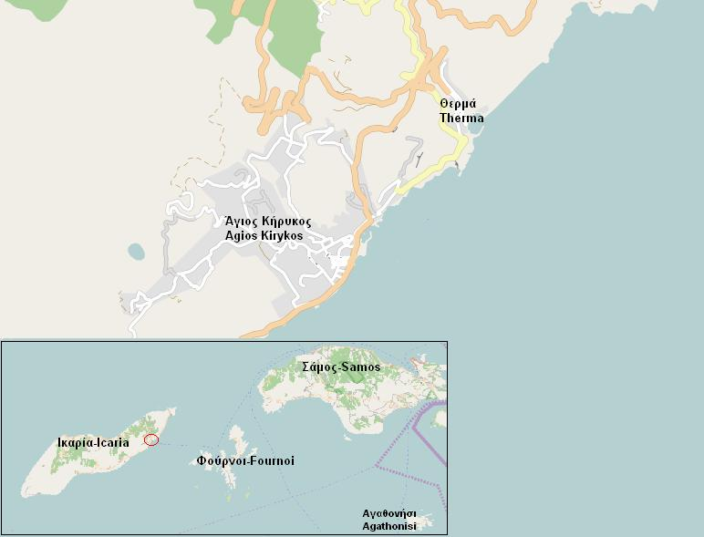 Θερμα Ικαρίας. Therma, Icaria